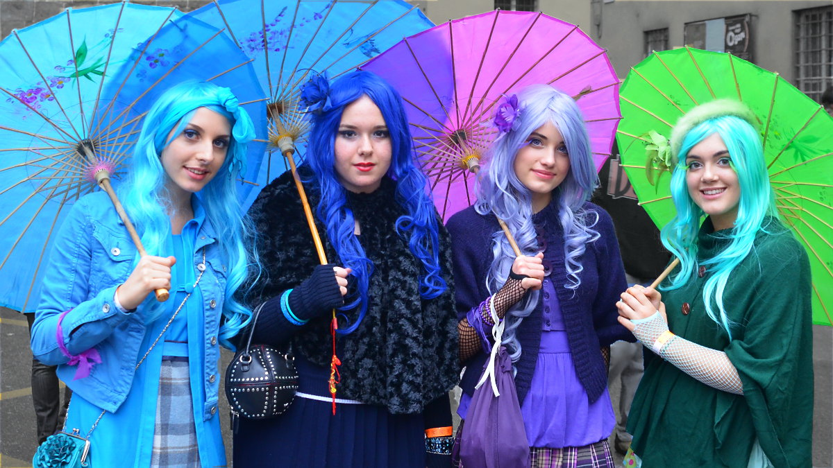 Caos in autostrada, confusione, pioggia, ma grazie ai fantastici cosplayer comunque una bellissima giornata!